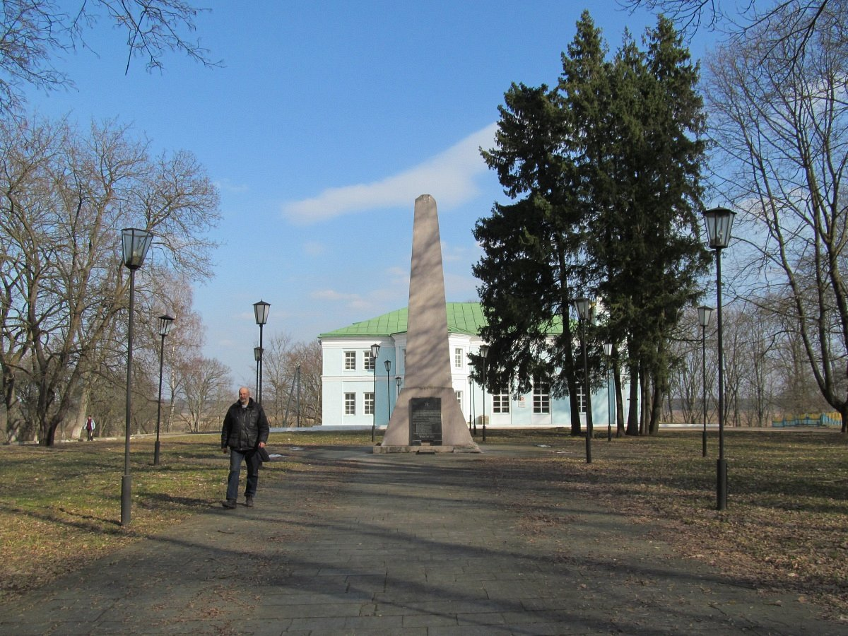 Дашкаўка. Сядзіба